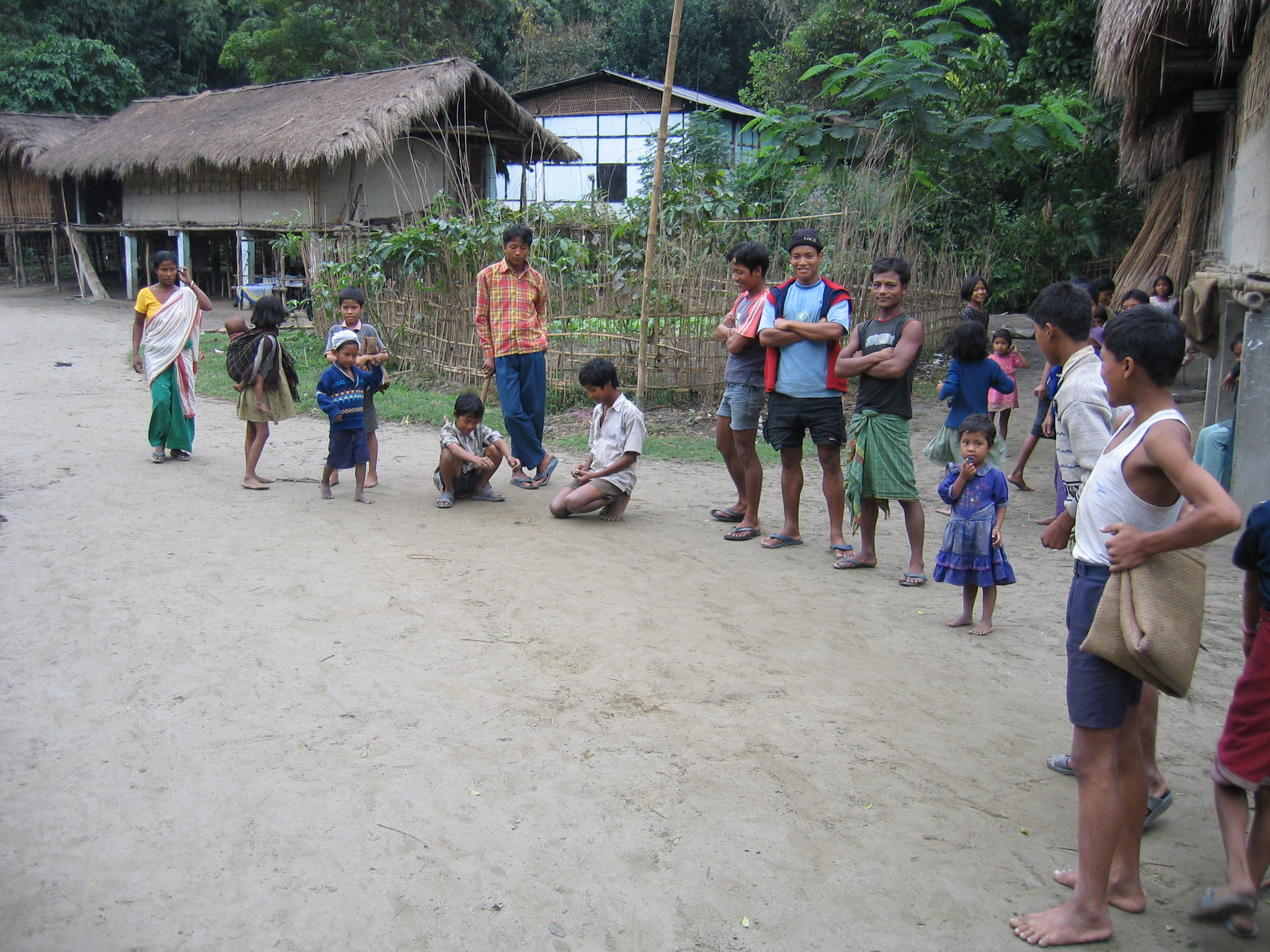 Tribal village on Majuli